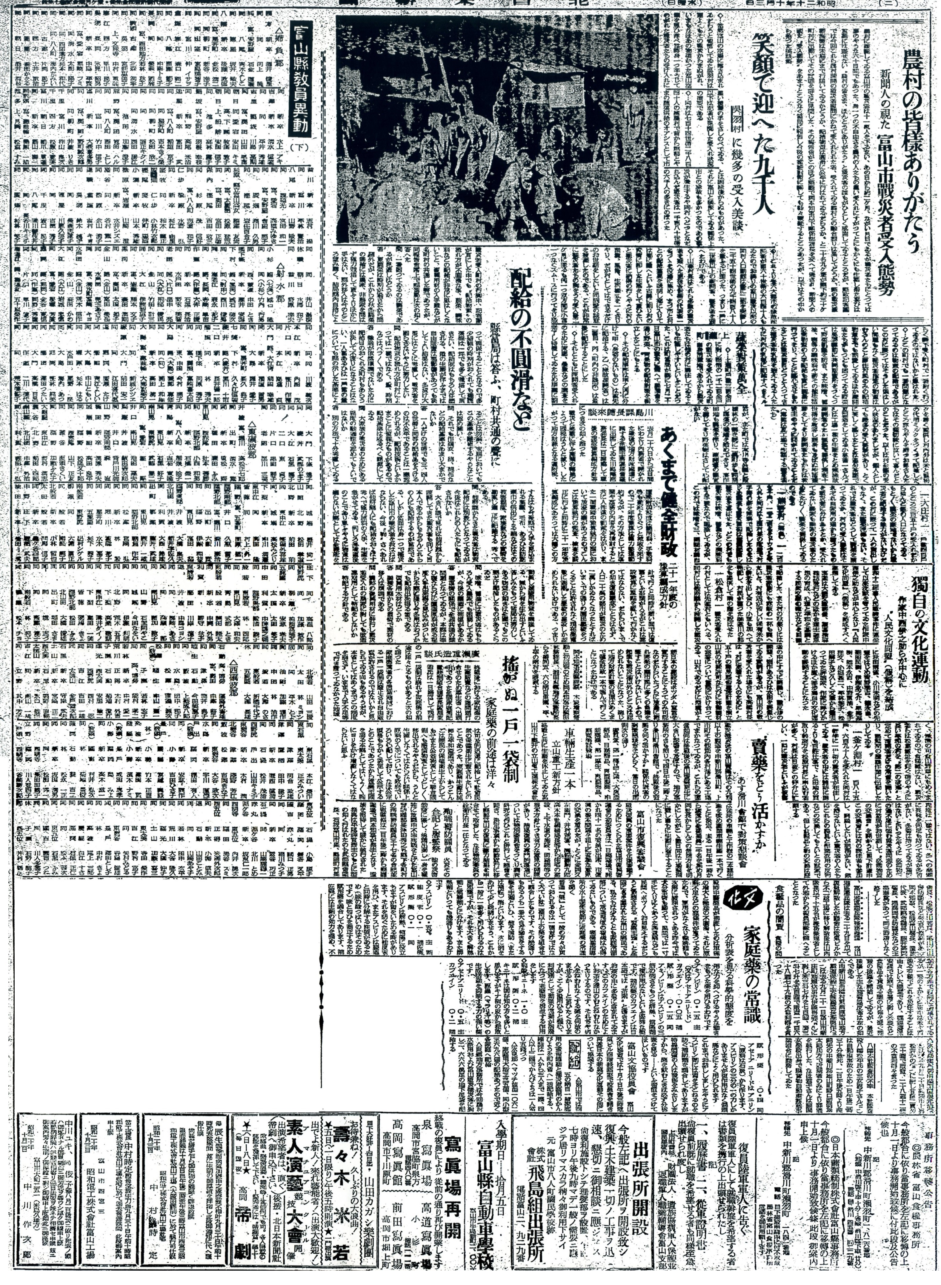 農村の皆様ありがたう 新聞人の視た富山市戦災者受入態勢